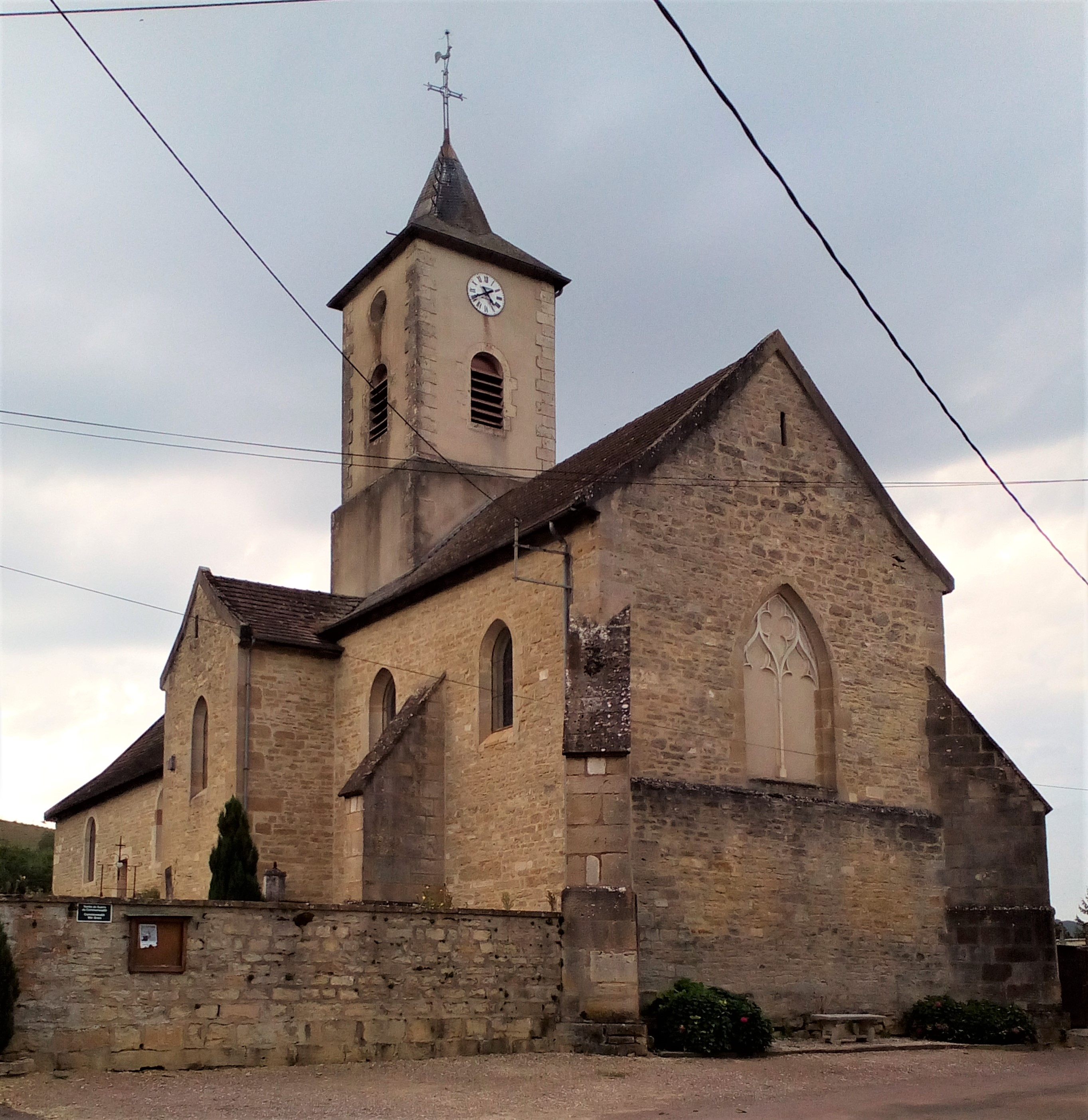 Chevet de l'église Saint-Rémi de Blaisy-Bas (21).